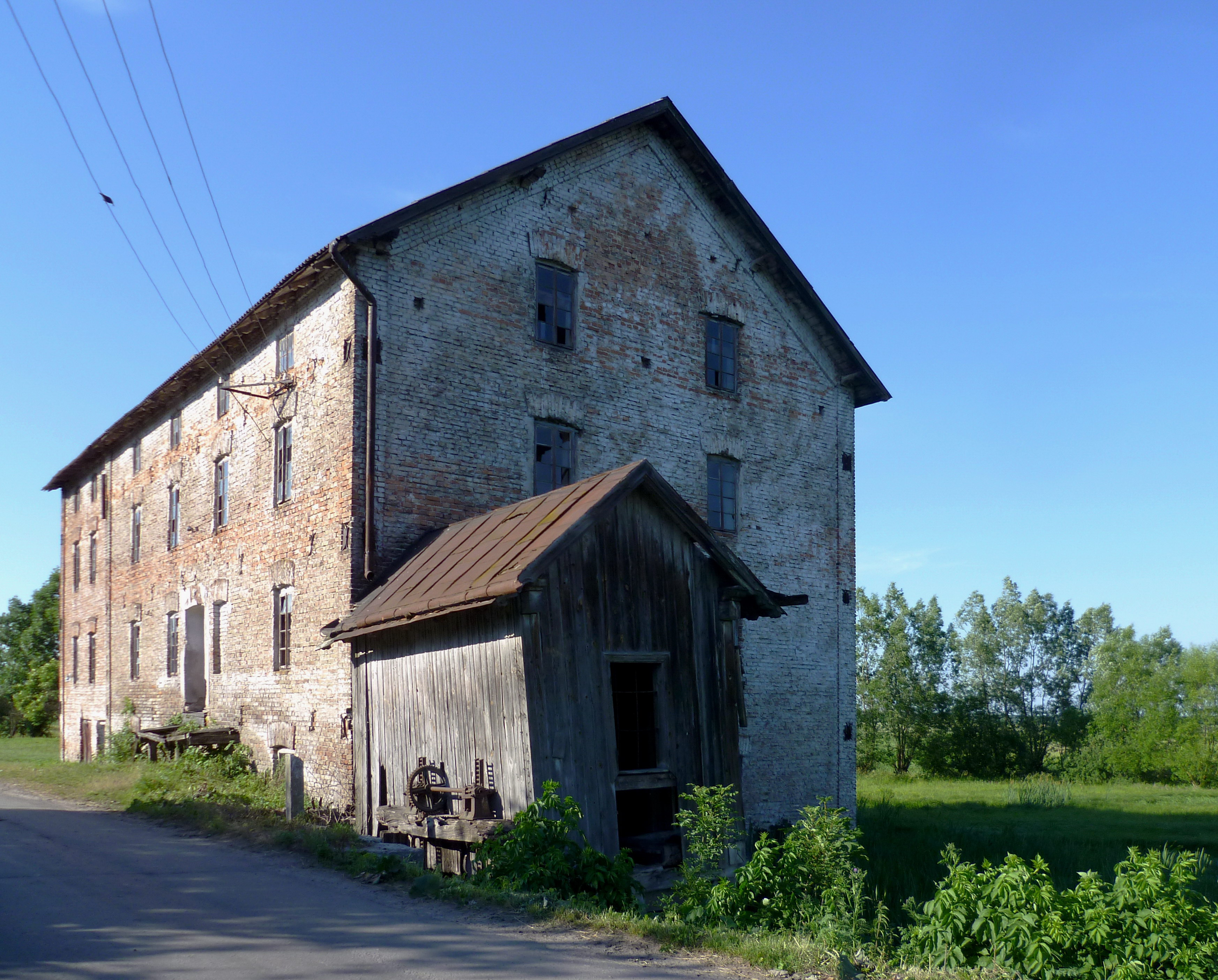 Млин водяний (2 половина ХІХ ст.) - загальний вигляд - в м.Угневі (вул. Б.Хмельницького, 1) Сокальського району Львівської області України